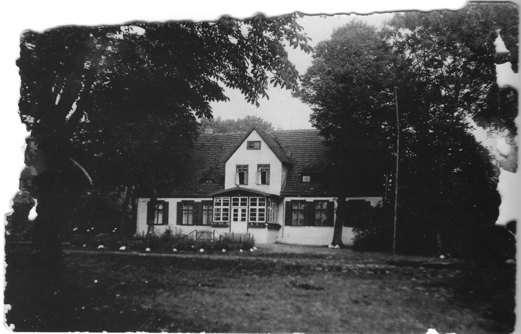 Das Gutshaus in Albertsdorf um 1933